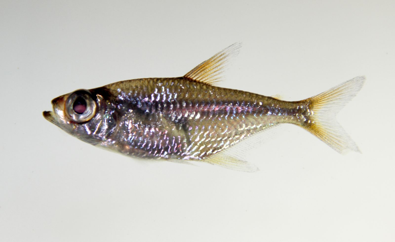 Heterocharax sp.